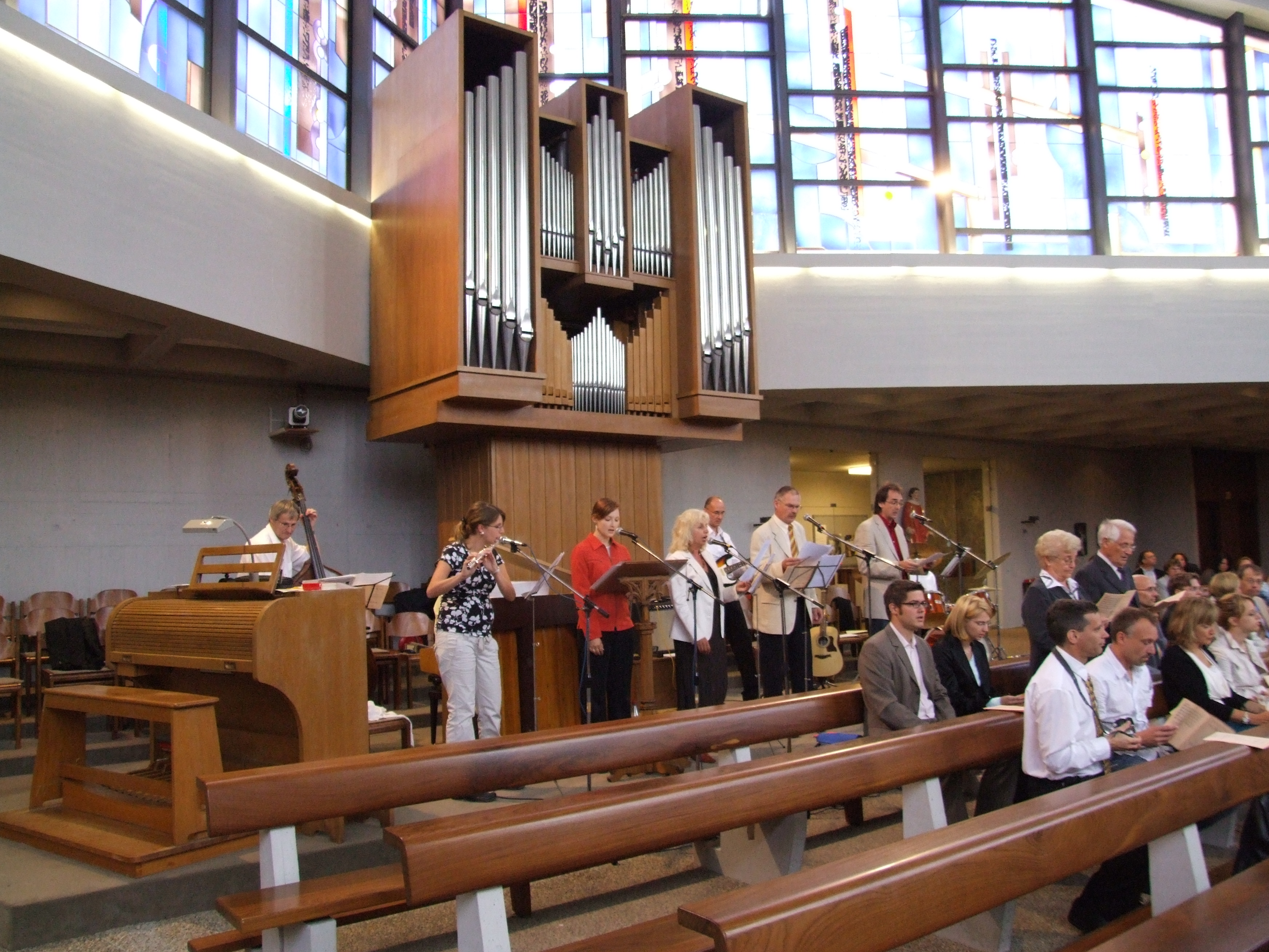 Band vor der Orgel St. Konrad, Speyer